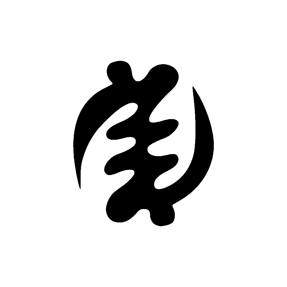 Símbolo adinkra. Significado: "Gye nyame" (Gracias a Dios). Símbolo de la supremacía de Dios.